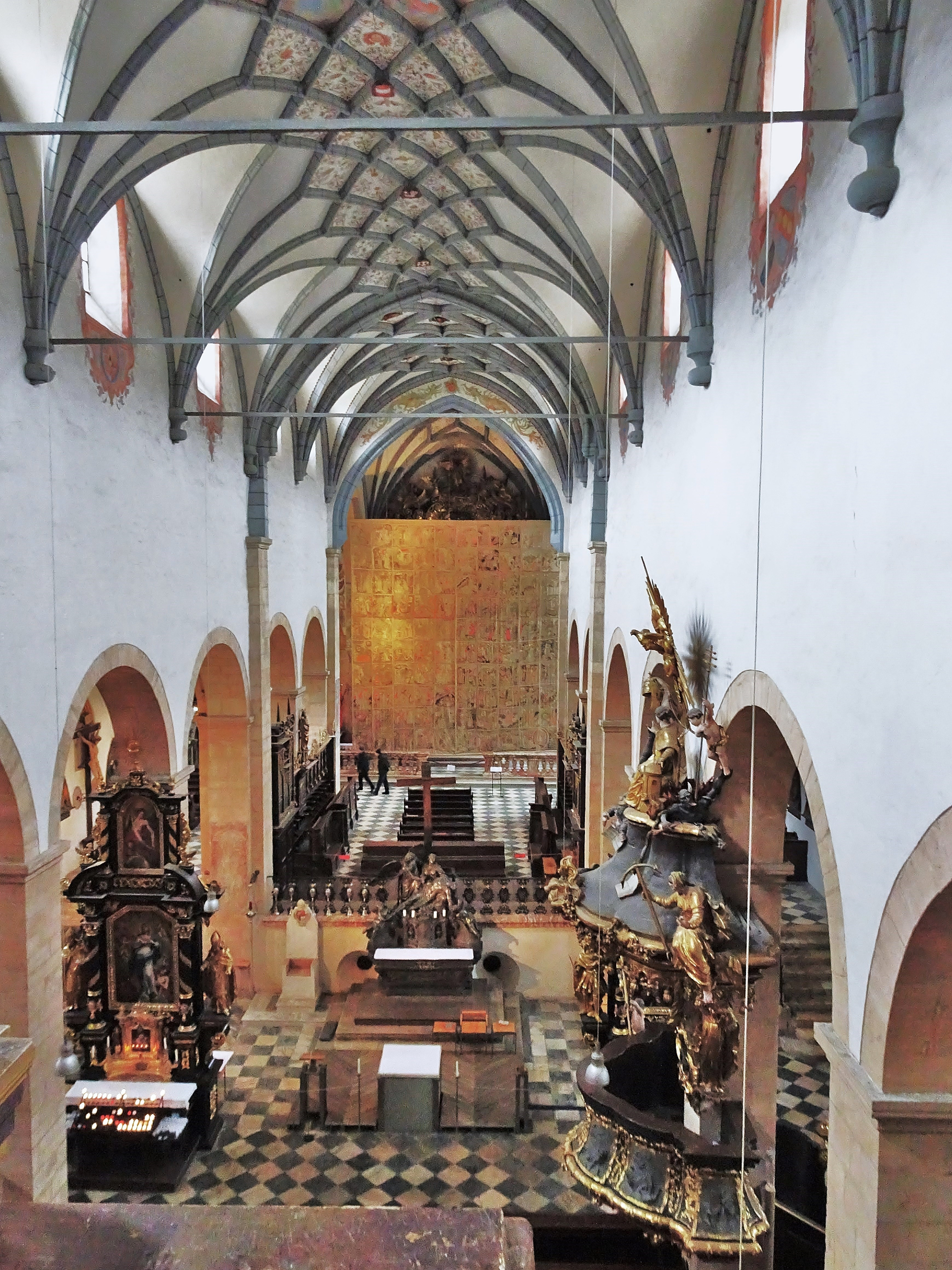 Dom zu Gurk, Innenansicht mit dem Fastentuch vor dem Hochaltar